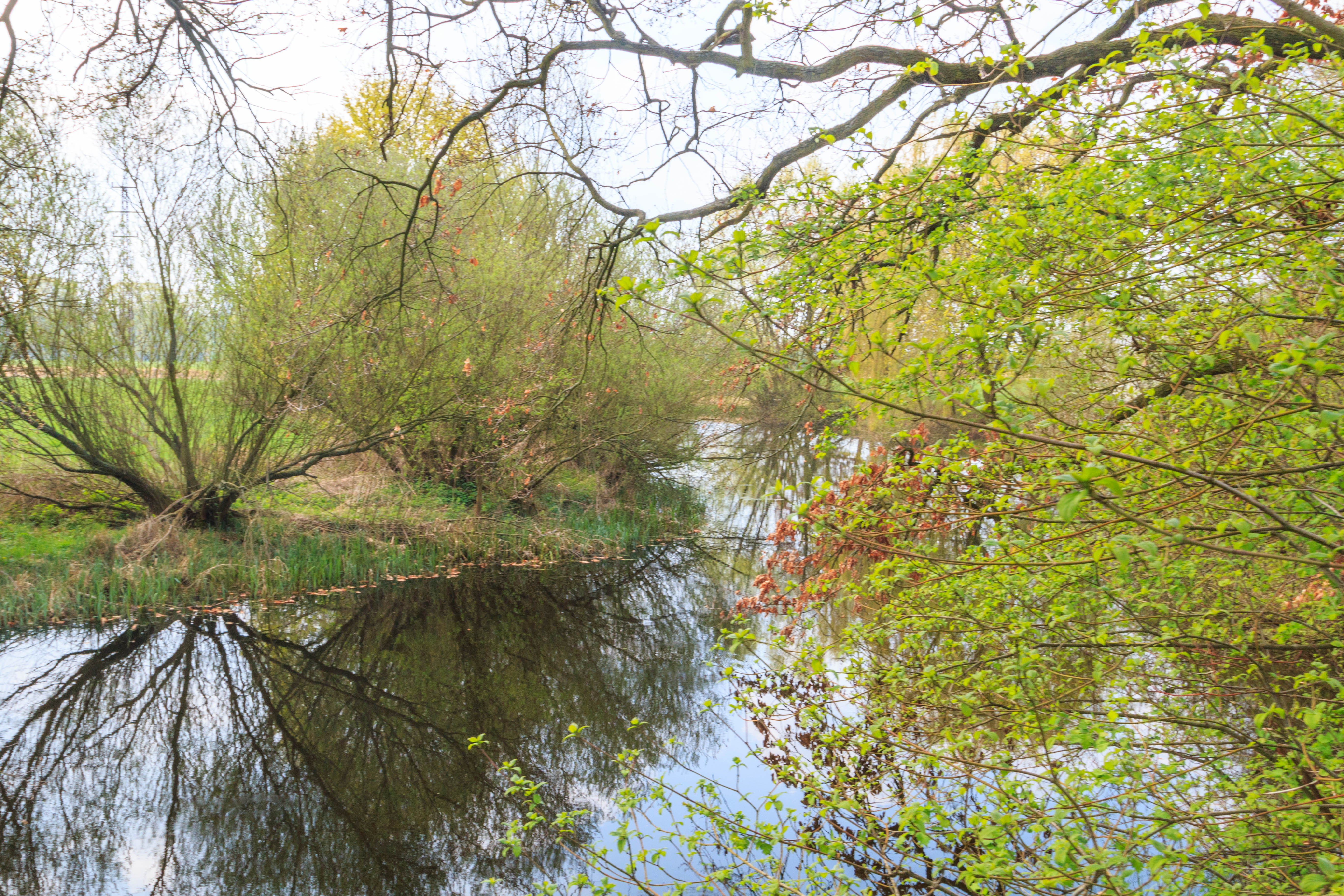 Farské jezero - staré rameno Labe u Hradce Králové Project: Vodstvo.